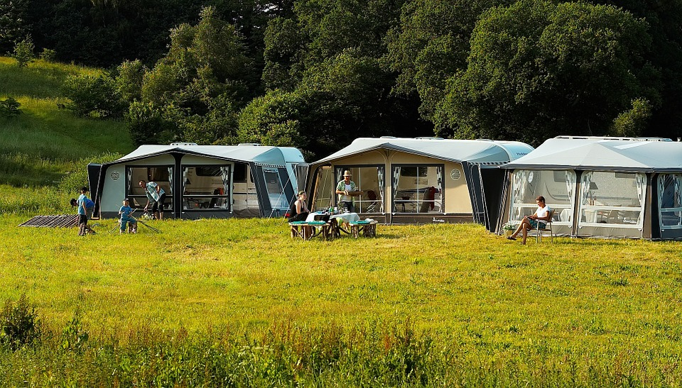 Camping med husvagn och förtält, ett populärt sätt att campa på i Norra Europa.